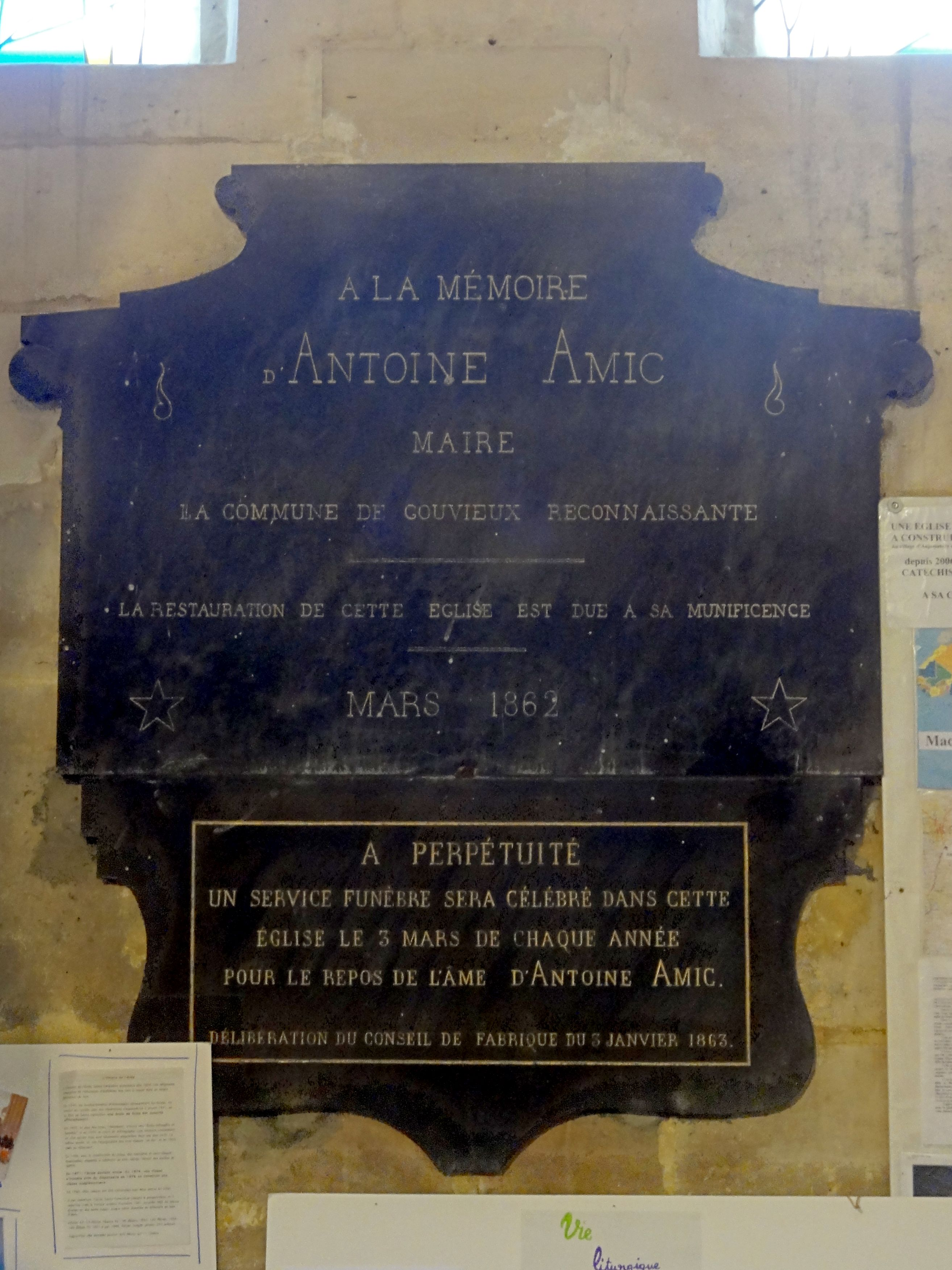 Plaque commémorative pour Antoine Amic, maire de Gouvieux, qui fit restaurer l'église.